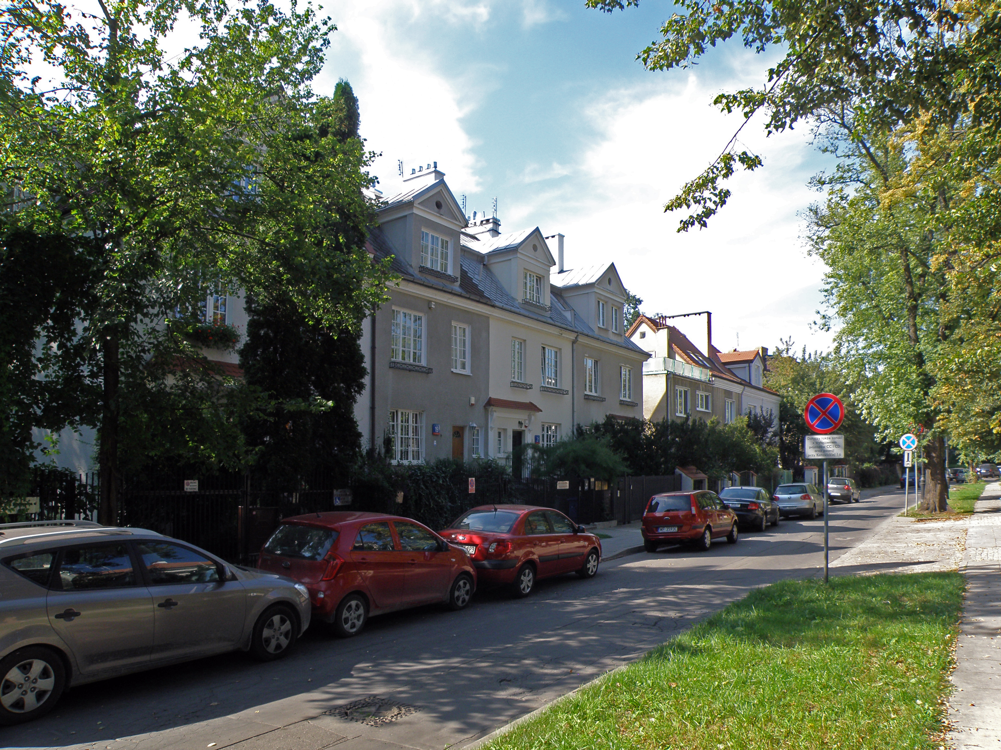 Dom (segment), ok. 1930, ul. Katowicka 19 (982-A z 13.06.1979), Warszawa.